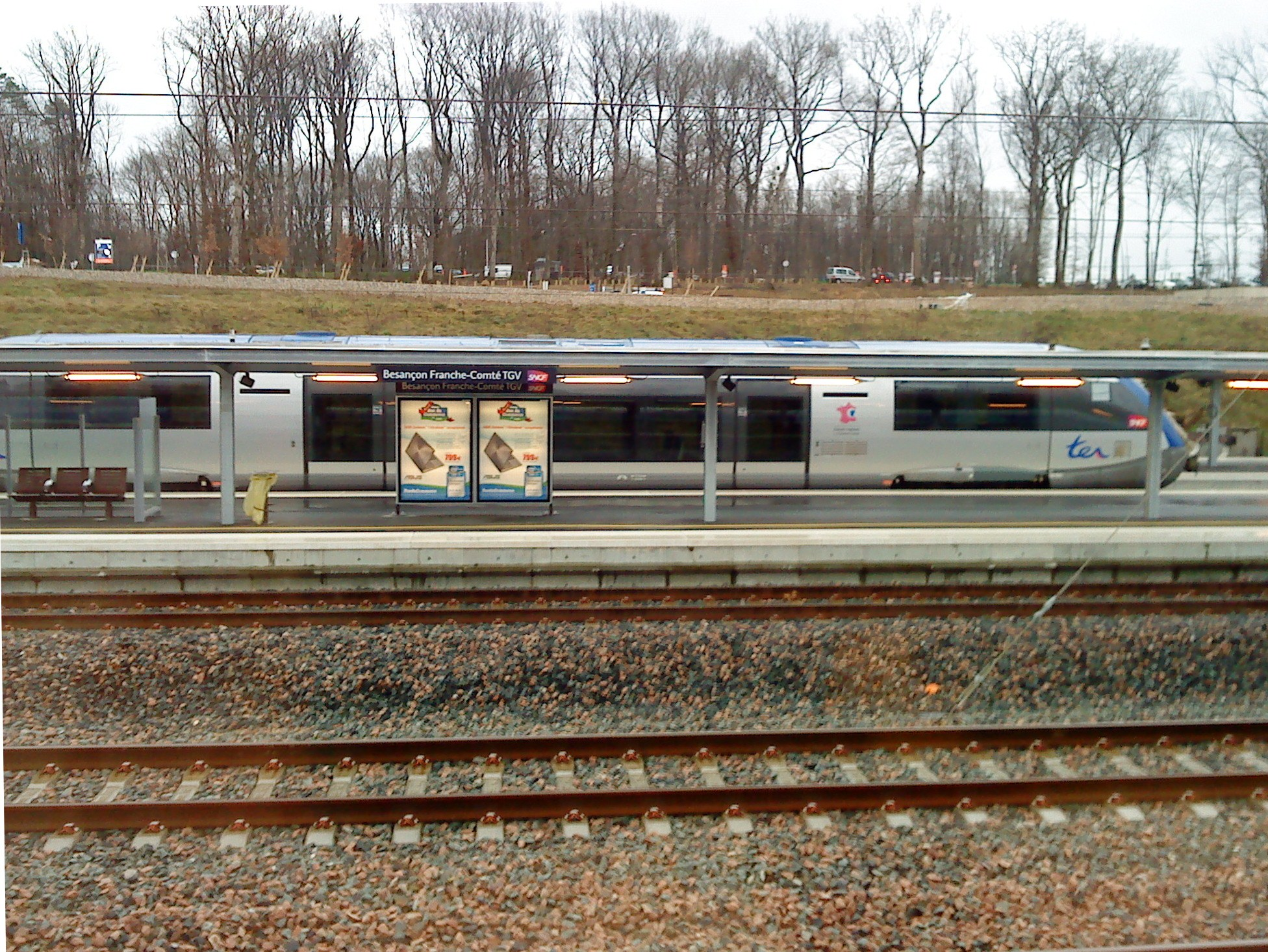 Une correspondance TER à la gare de Besançon Franche-Comté TGV.